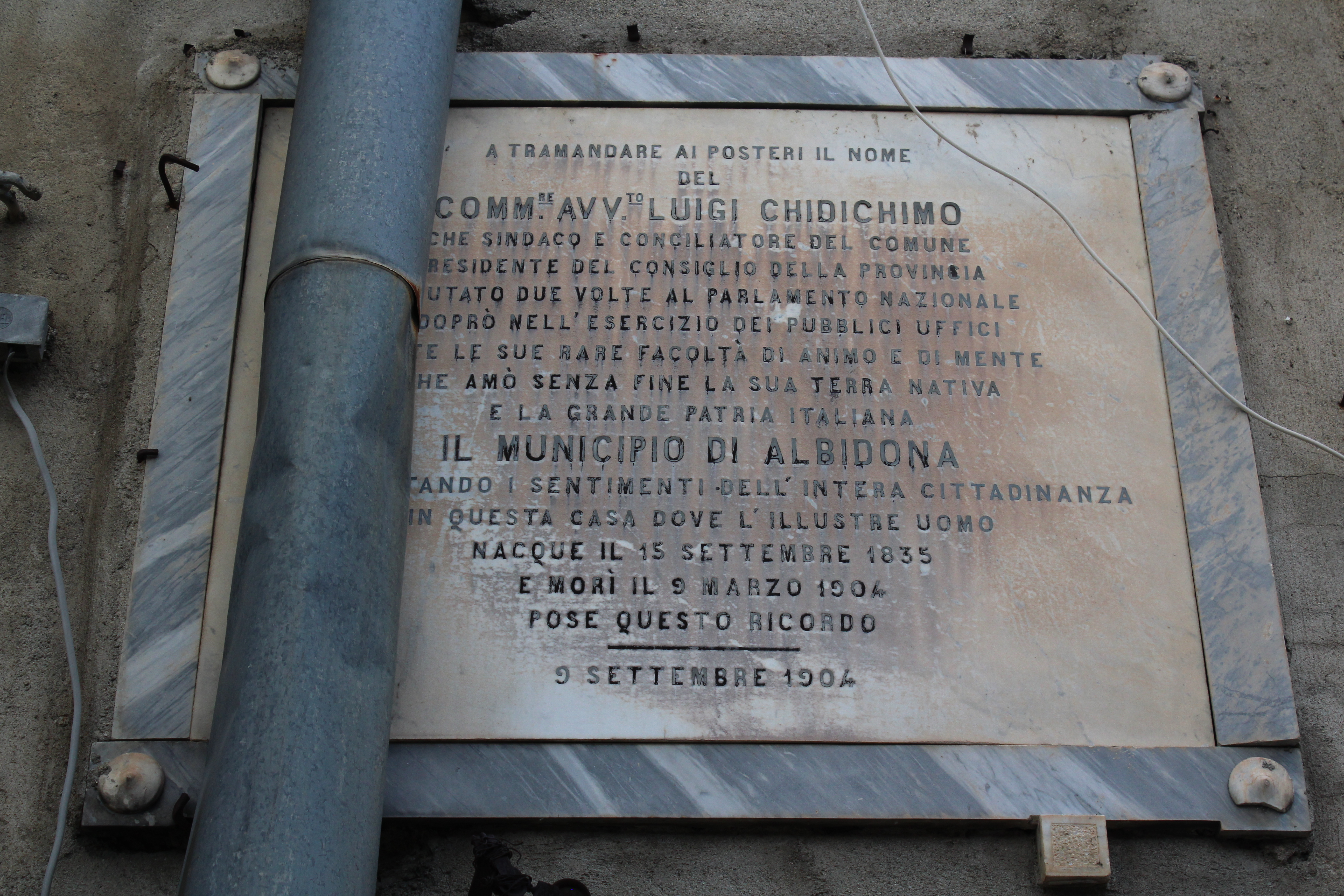 Targa in memoria del deputato Luigi Chidichimo (Albidona).